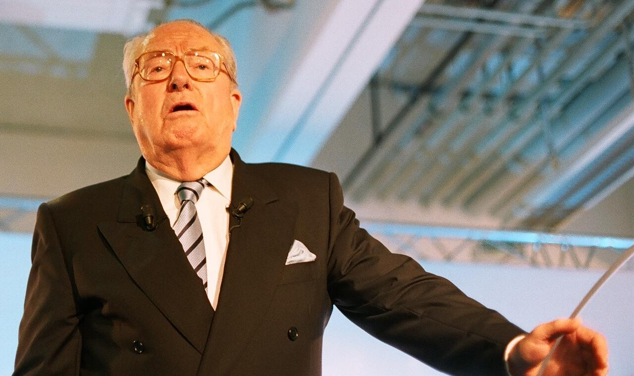 Jean-Marie Le Pen au meeting du Front National à Paris